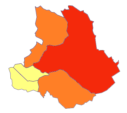 Distribución demográfica por municipios de la comarca de Cervera